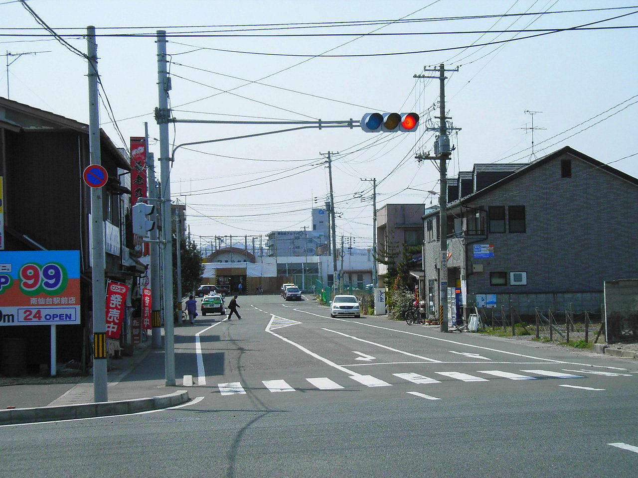 Miyagi Prefectural Road 130 Minami-Sendai Station Line. Nakada, Taihaku ward, Sendai, Miyagi prefecture, Japan.